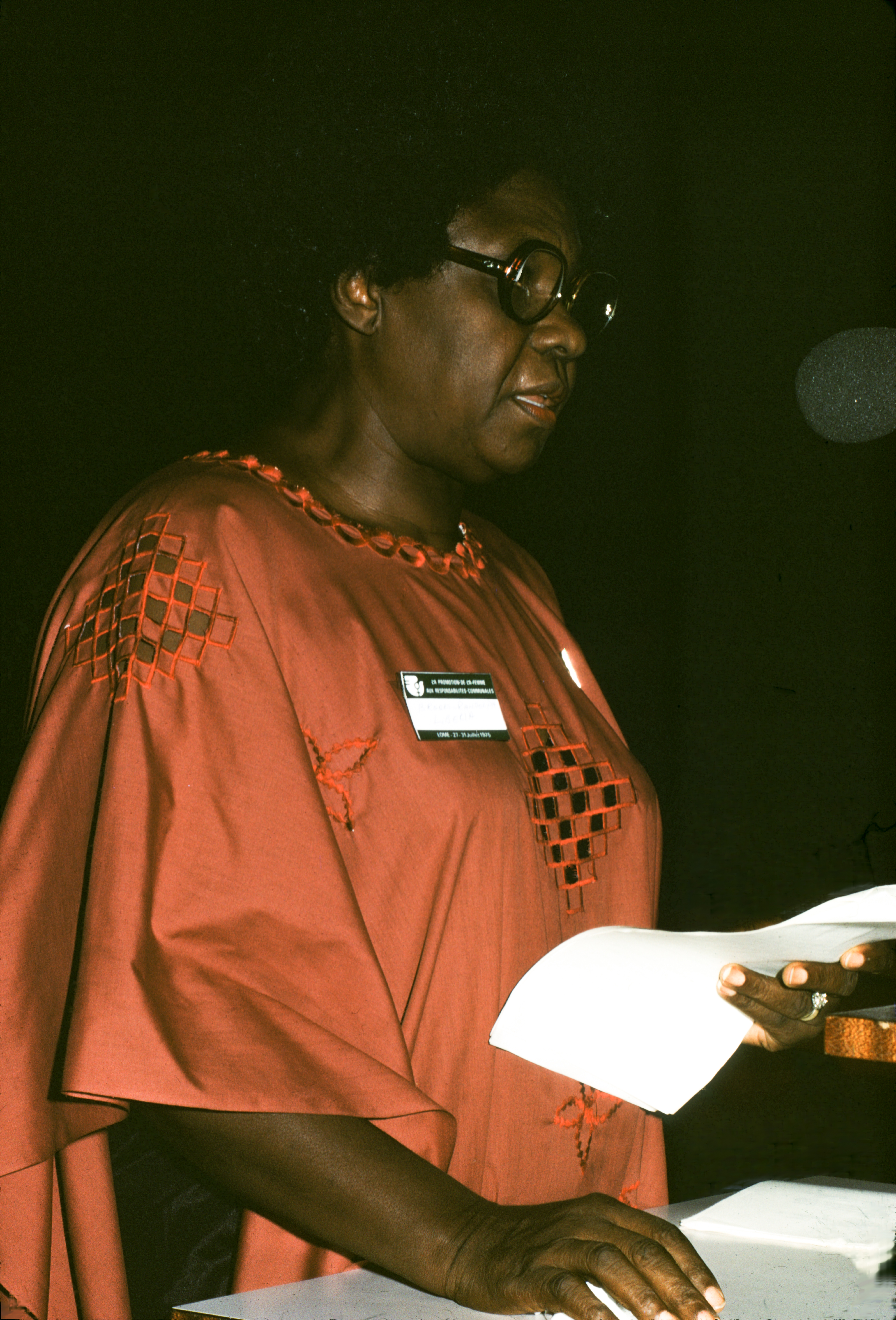 Colloque sur la promotion de la femme face aux responsabilités communales, organisé conjointement par l'Agence de coopération culturelle et technique et la Fédération mondiale des Villes jumelées à Lomé au Togo du 26 au 31 juillet 1975. Angie Brooks-Randolph (Libéria), première femme à présider les travaux de l'Assemblée générlae de l'ONU.